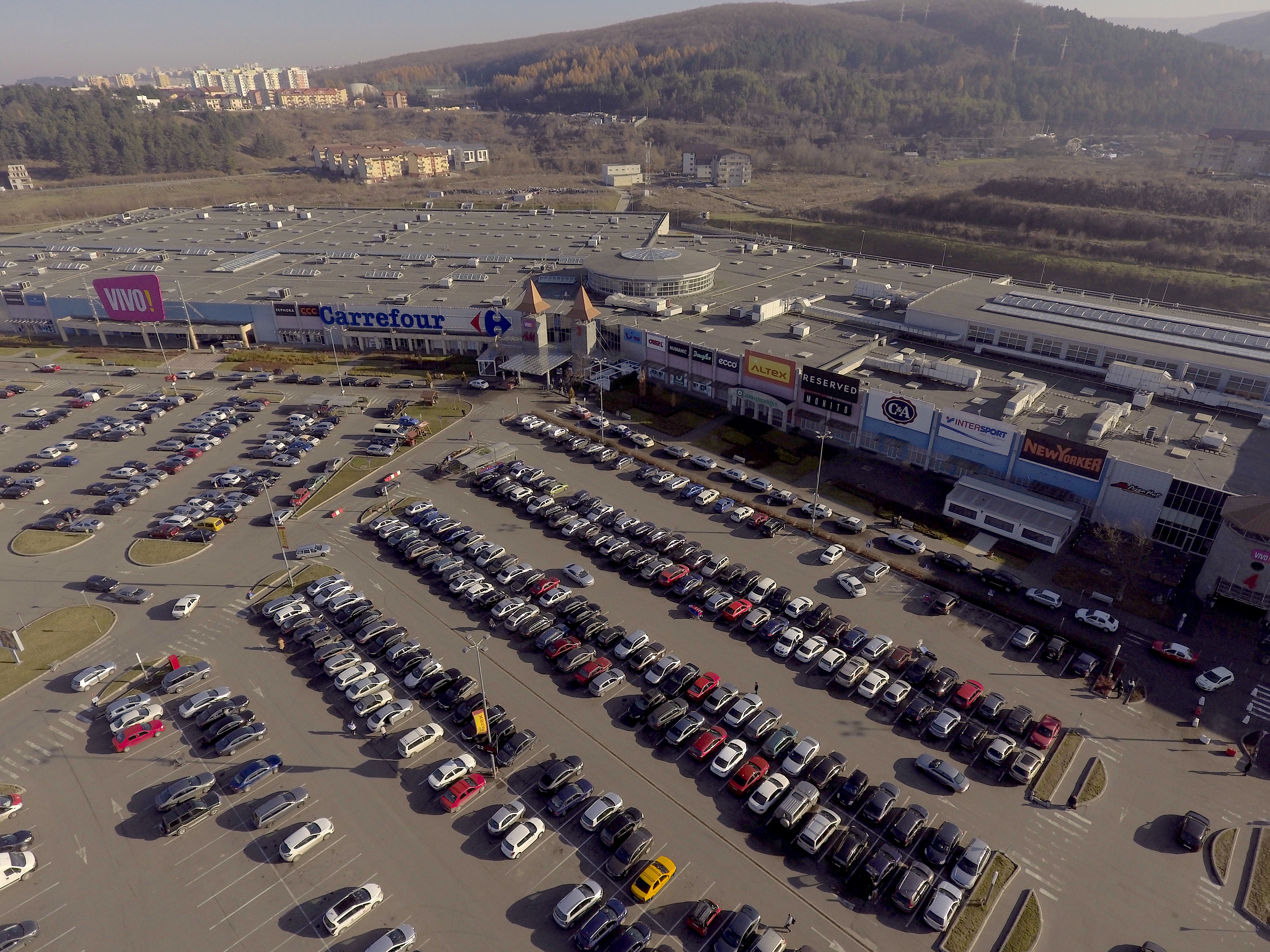 (c) Marian Hurducaș